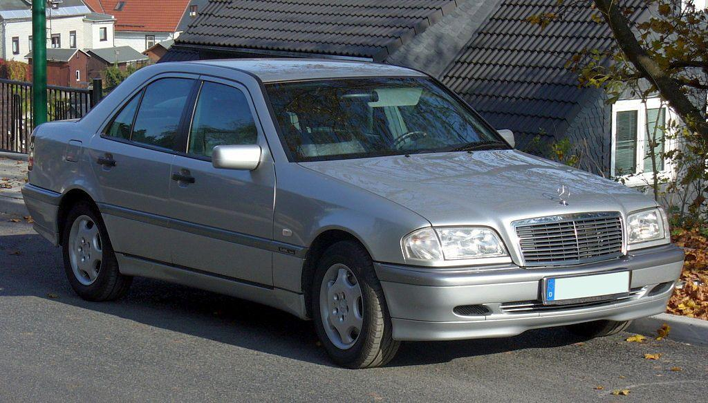 Mercedes-Benz W202 Classic